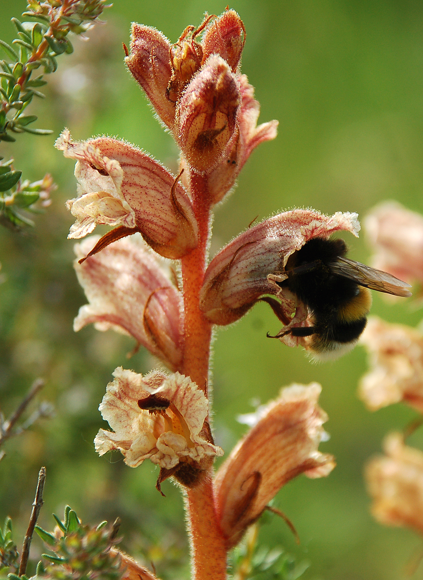 Nous voyons un Bourdon (Bombus ? Bombus magnus ??) butiner une Orobanche teucrii. Ce cliché est pris à contre jour afin de donner une certaine transparence à la plante et un reflet sur l'insecte. Cette plante sans chlorophylle est observable sur les plateaux calcaires et pelouses sèches du Gard vers le mois de MAI . On peut retrouver cette photo dans les travaux de Gérard JOYON concernant le Patrimoine naturel de POULX .